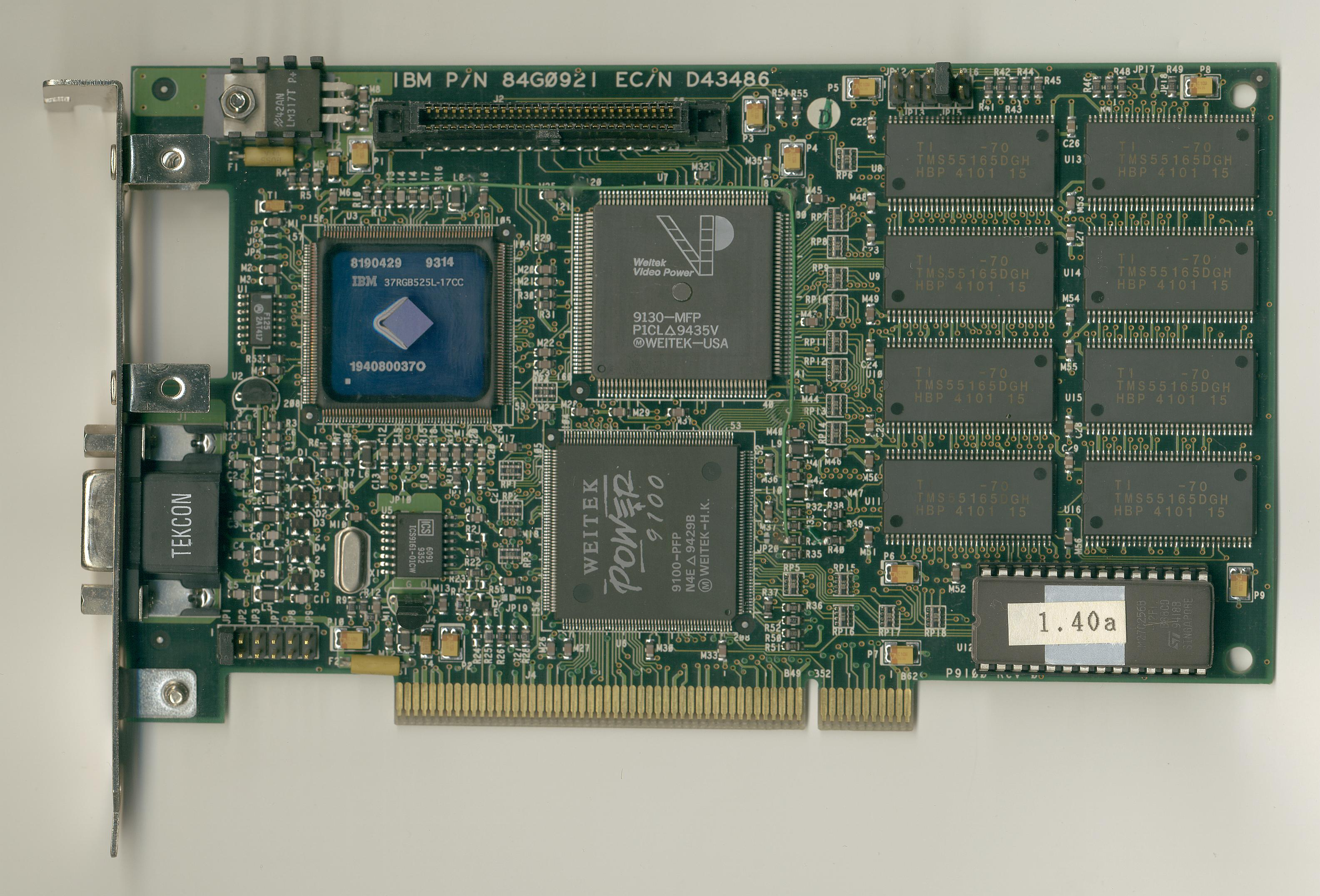 Weitek Power9100/9130 PCI 4MB